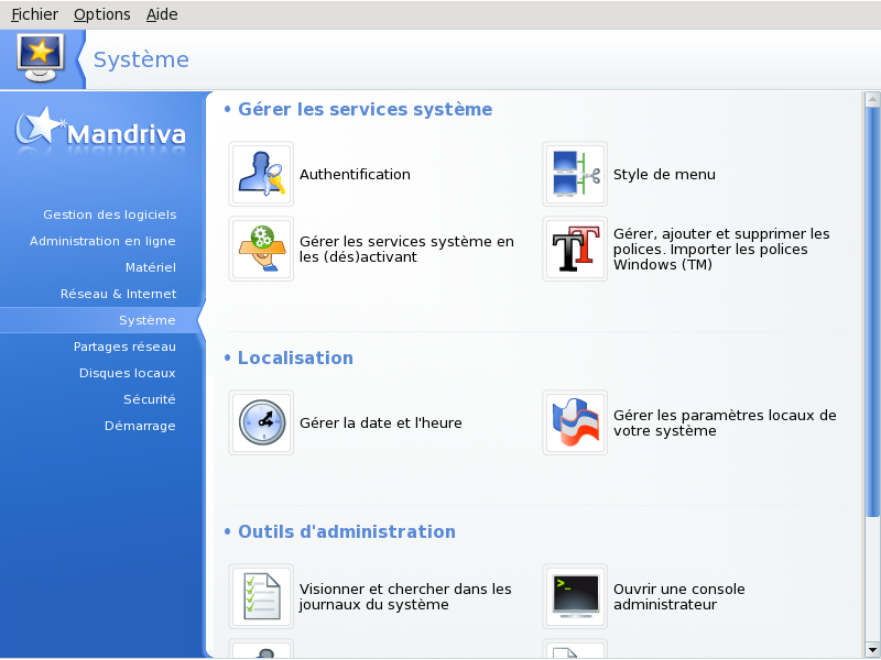 Nouveau Centre de Contrôle de Mandriva 2009.0 RC2